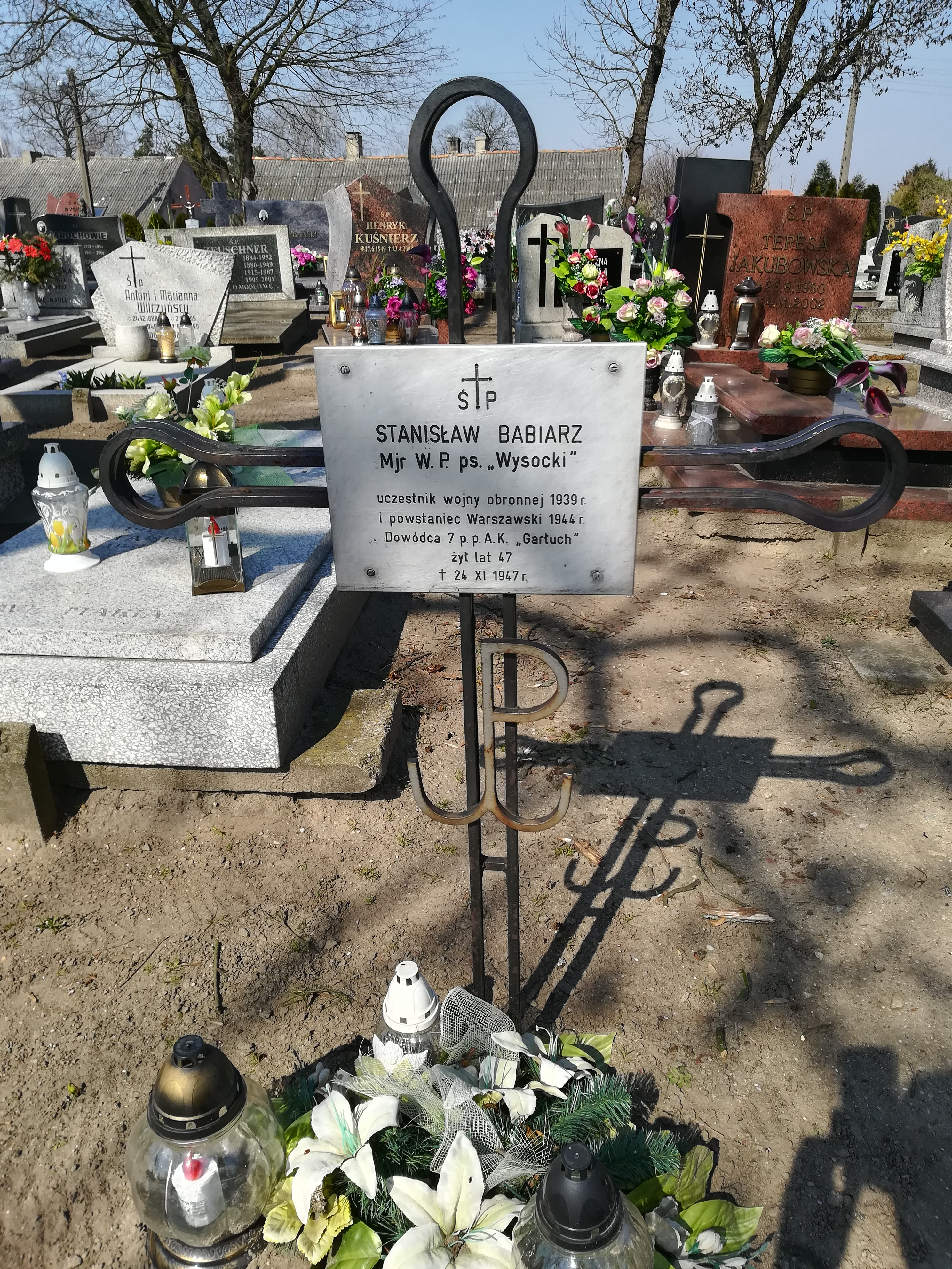 Symb. grób St. babiarza w Buku - cm. św. Rocha.